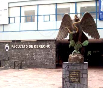 Foto tomada en la explanada de la Facultad de Derecho de Universidad Nacional Autonoma de México